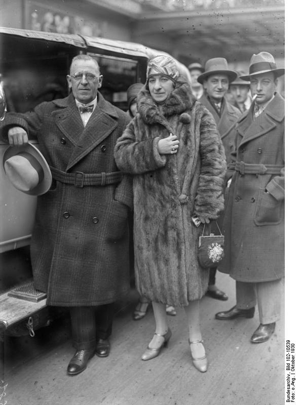 Dieser Mann hat sich ein Vermögen zusammengelacht! Grock, der König der Clowns mit seiner Gattin, welcher augenblicklich in Berlin zum letzten Male gastiert, wird sich nach diesem Gastspiel an der Riviera zur Ruhe setzen. Sein Vermögen beträgt mehrere Millionen Mark.